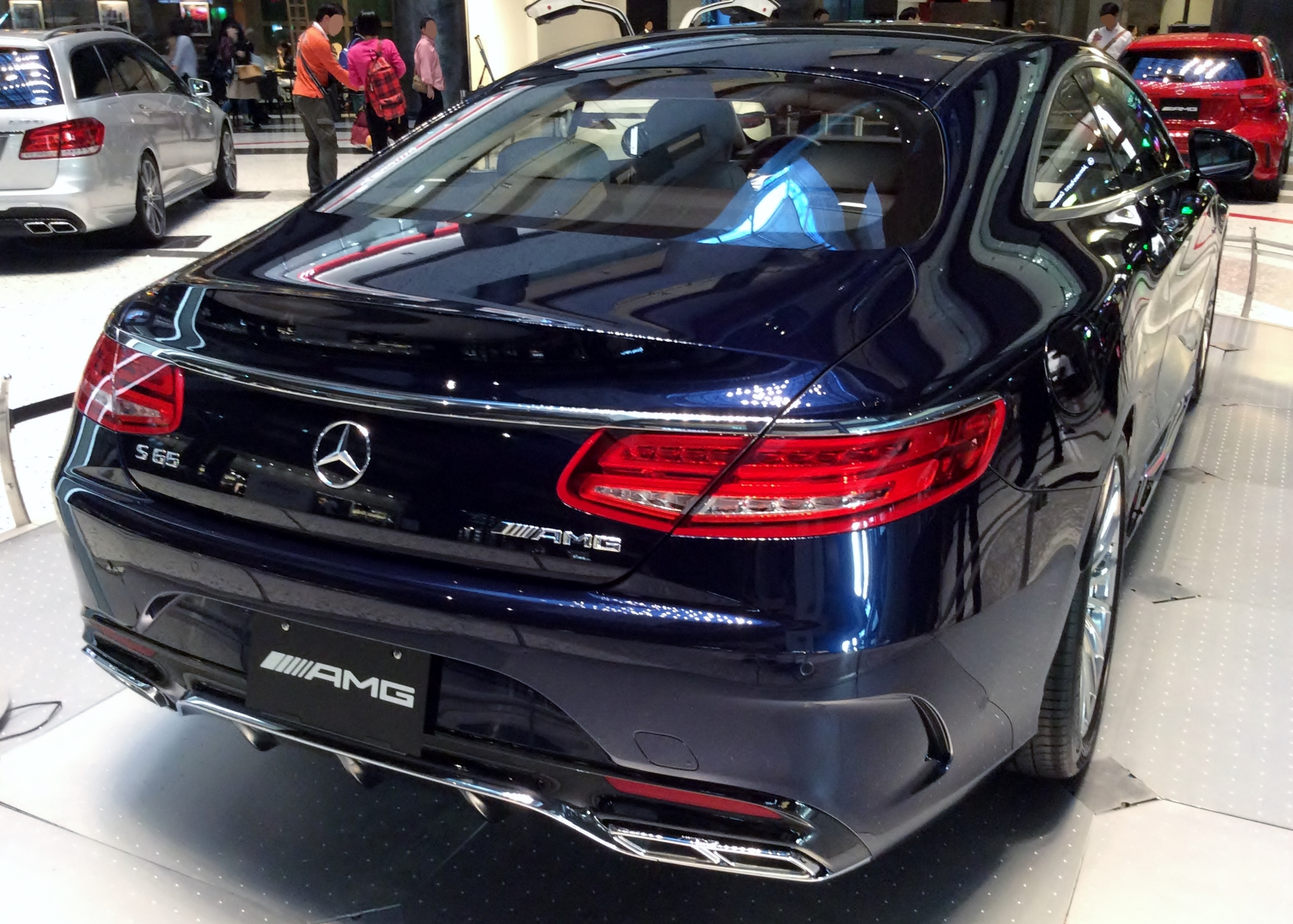 C217型メルセデス・ベンツS65 AMG クーペをリアから撮影。